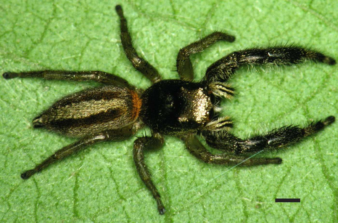 Female Marpissa bina jumping spider from Cedar Key, Florida, USA